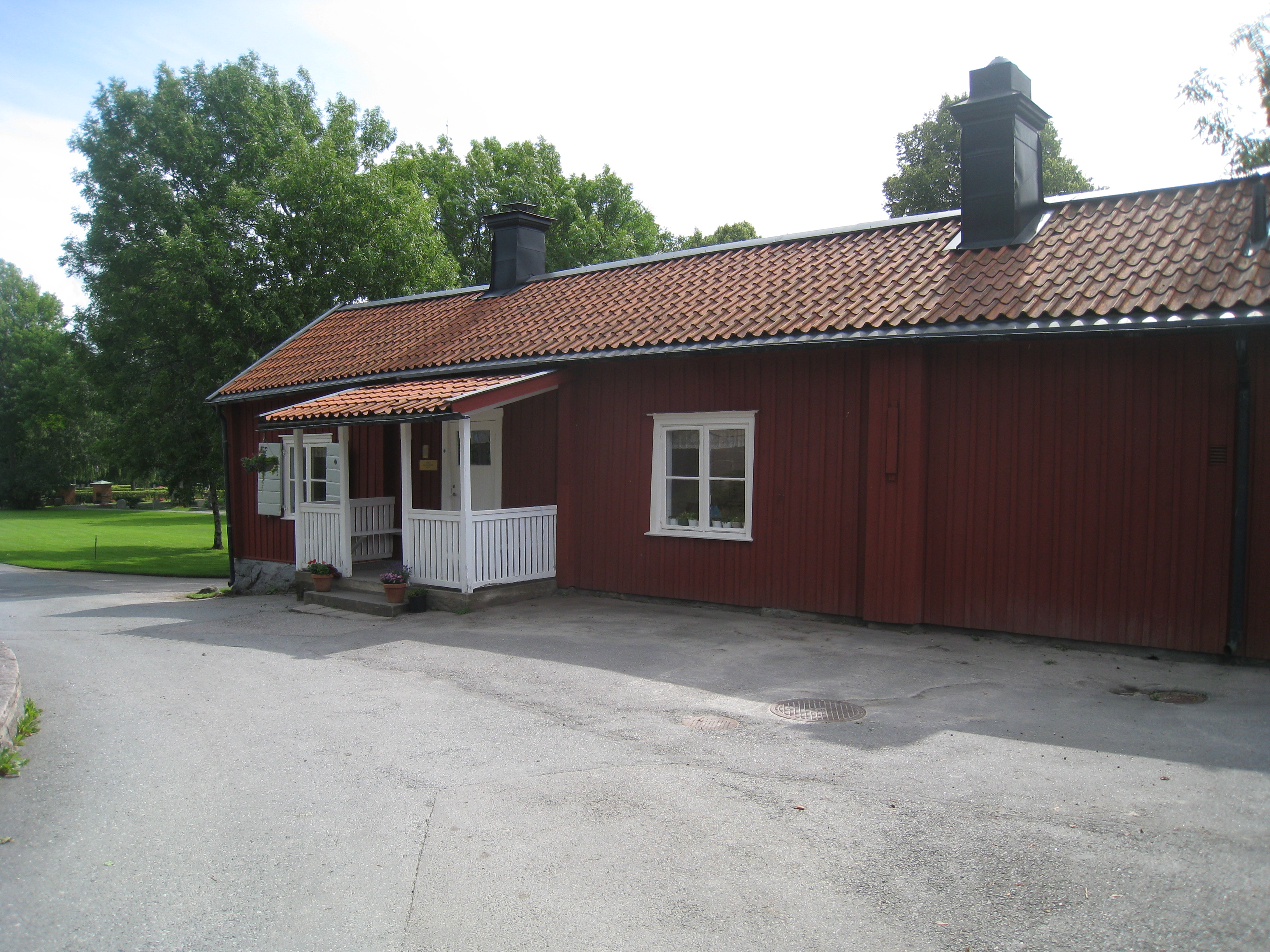 Gamla Klockargården vid Bromma kyrka, Bromma, Stockholm. Byggnaden uppfördes 1808 efter att en tidigare byggnad på samma plats helt brunnit ned 1805. Den nyuppförda byggnaden från 1808 var även avsedd till komministerbostad och bestod av två rum och kök.